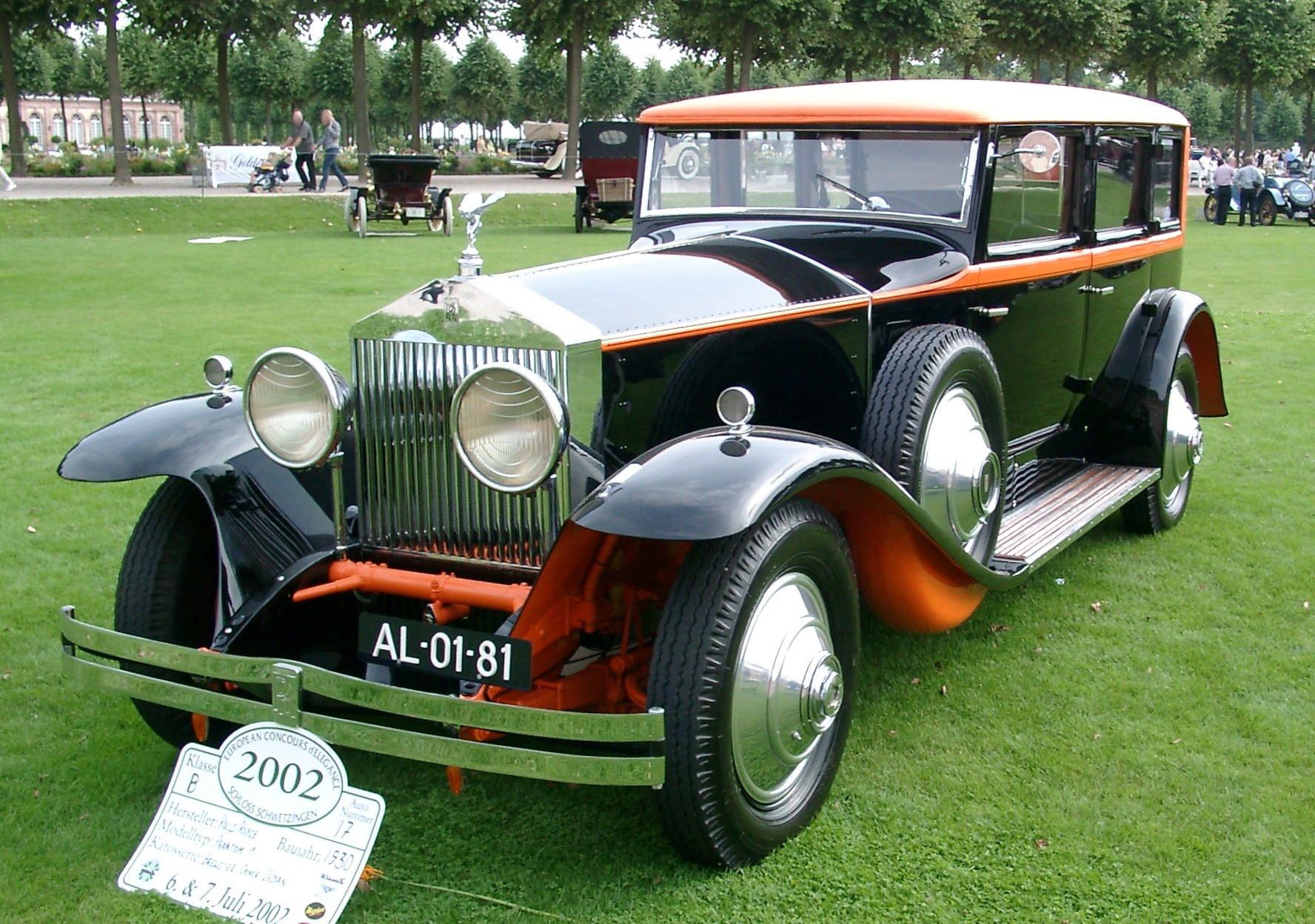 In Springfield (Massachusetts) 1930 gebauter Rolls-Royce Phantom 1 mit Brewster "Dover" Limousinen-Aufbau. Fotografiert anläßlich des European Concours d'Elegance 2002 in Schwetzingen Rolls-Royce unterhielt die Produktionsstätte in Springfield von 1921-1931.